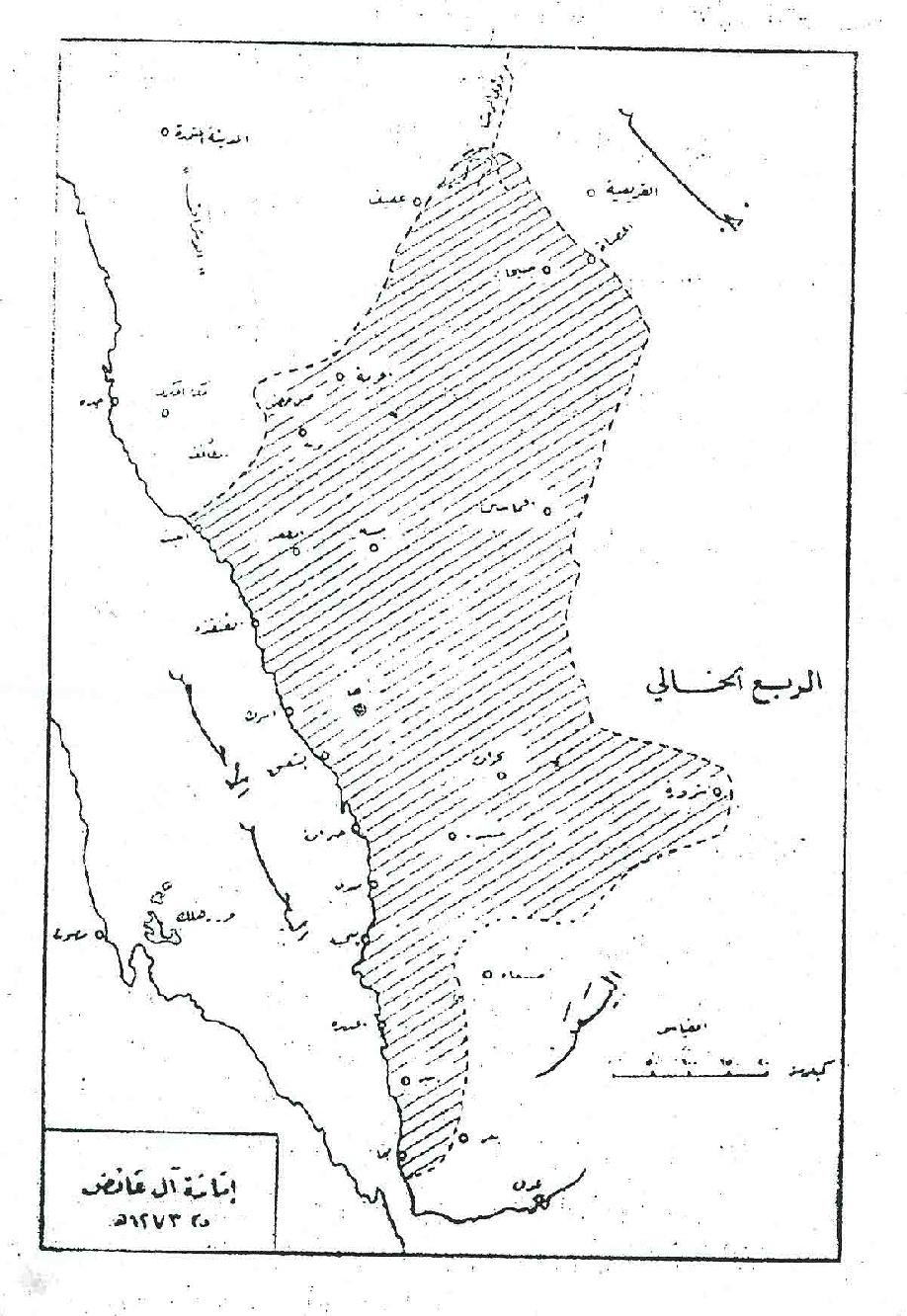 صورة لإمتداد حكم ال عائض عام 1273 هـ ويظهر فيها (الظفير)